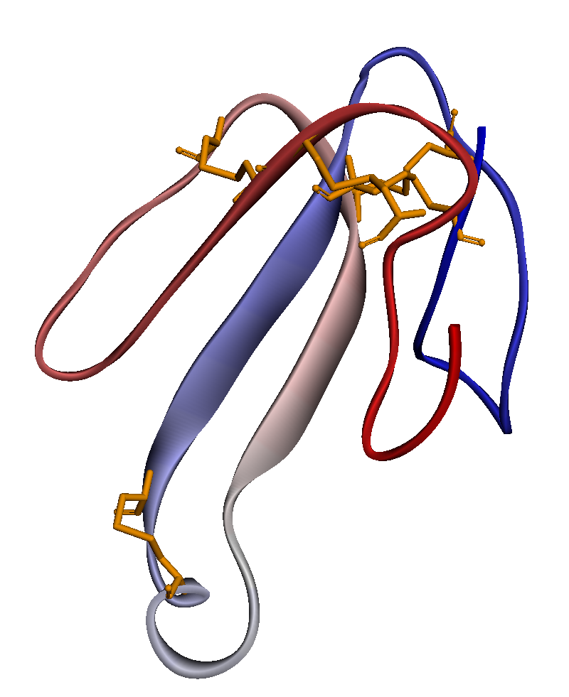 Ленточная диаграмма пространственной структуры α-бунгаротоксина, установленной с помощью метода рентгеноструктурного анализа (PBD ID 4HQPJ) .